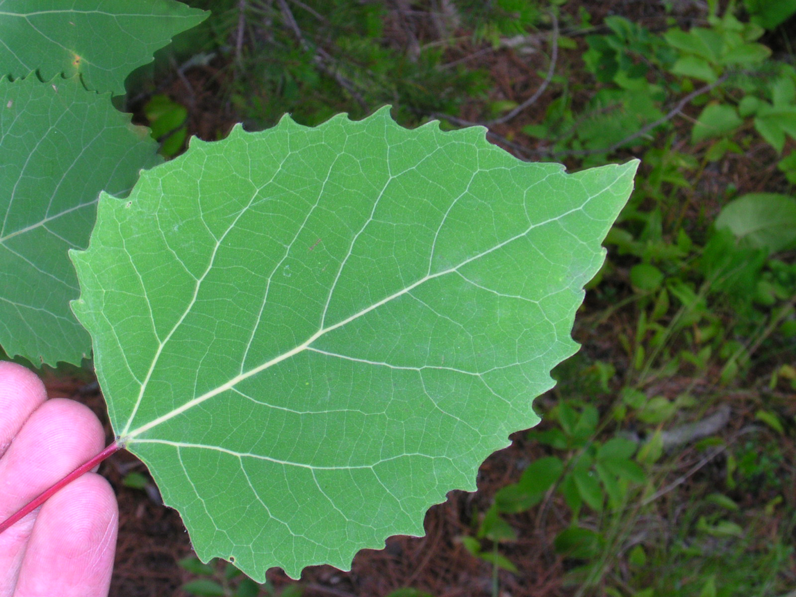 Populus grandidentata 2-jgreenlee